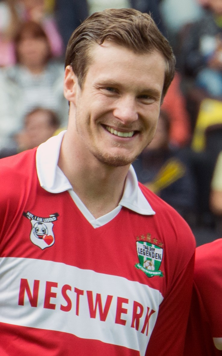 Marcell Jansen als Spieler vom Team Hamburg beim Tag der Legenden 2016